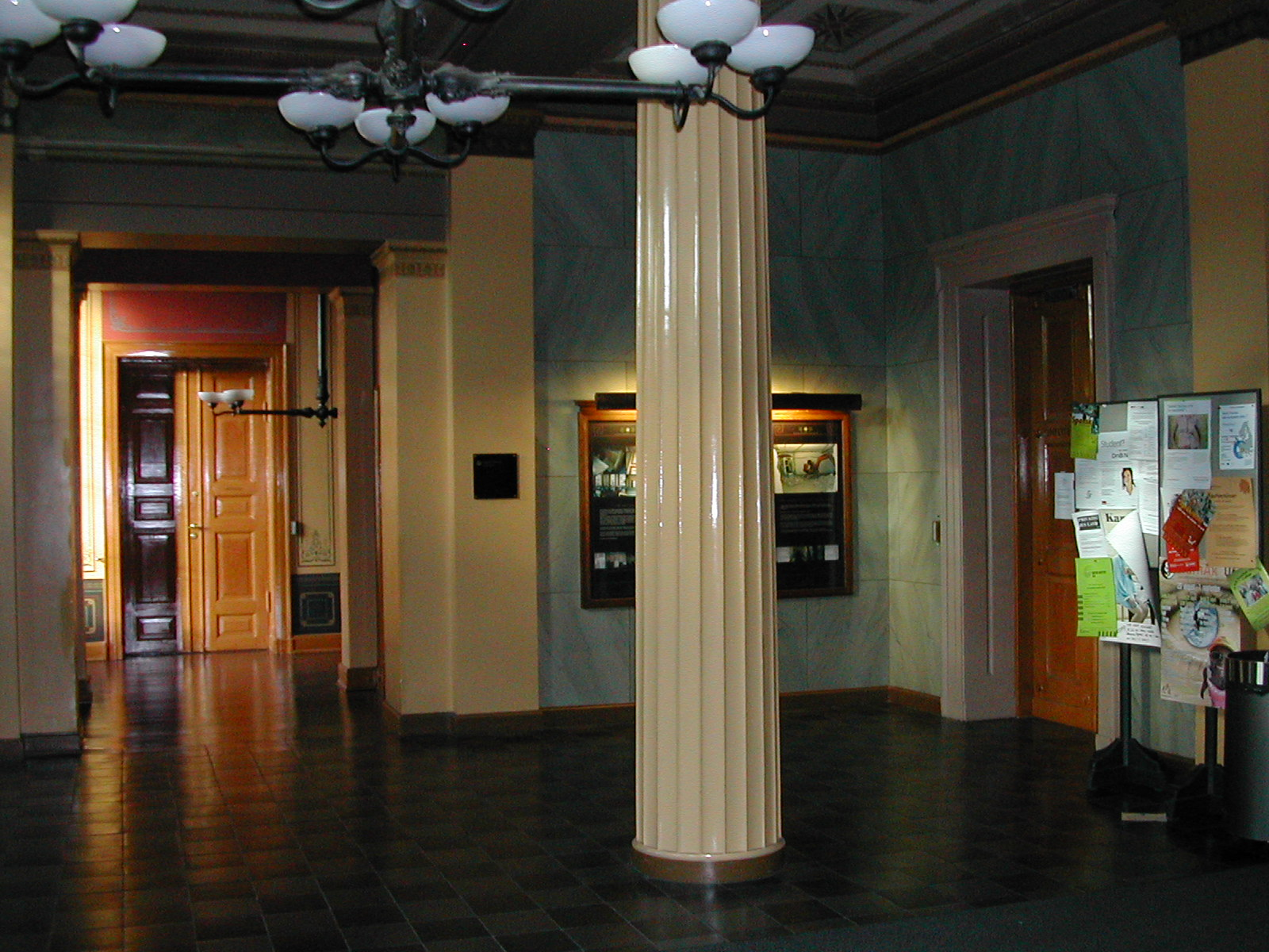 Domus Academica, Universitetet i Oslo (Karl Johan)